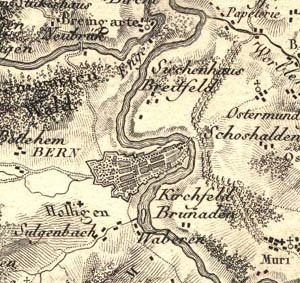 Bern im Meyer-Weiss-Atlas Es handelt sich dabei ausschliesslich um Scans von Karten, deren Copyright abgelaufen ist. Die Scans wurden von mir gemacht und zu Public Domain erklärt.